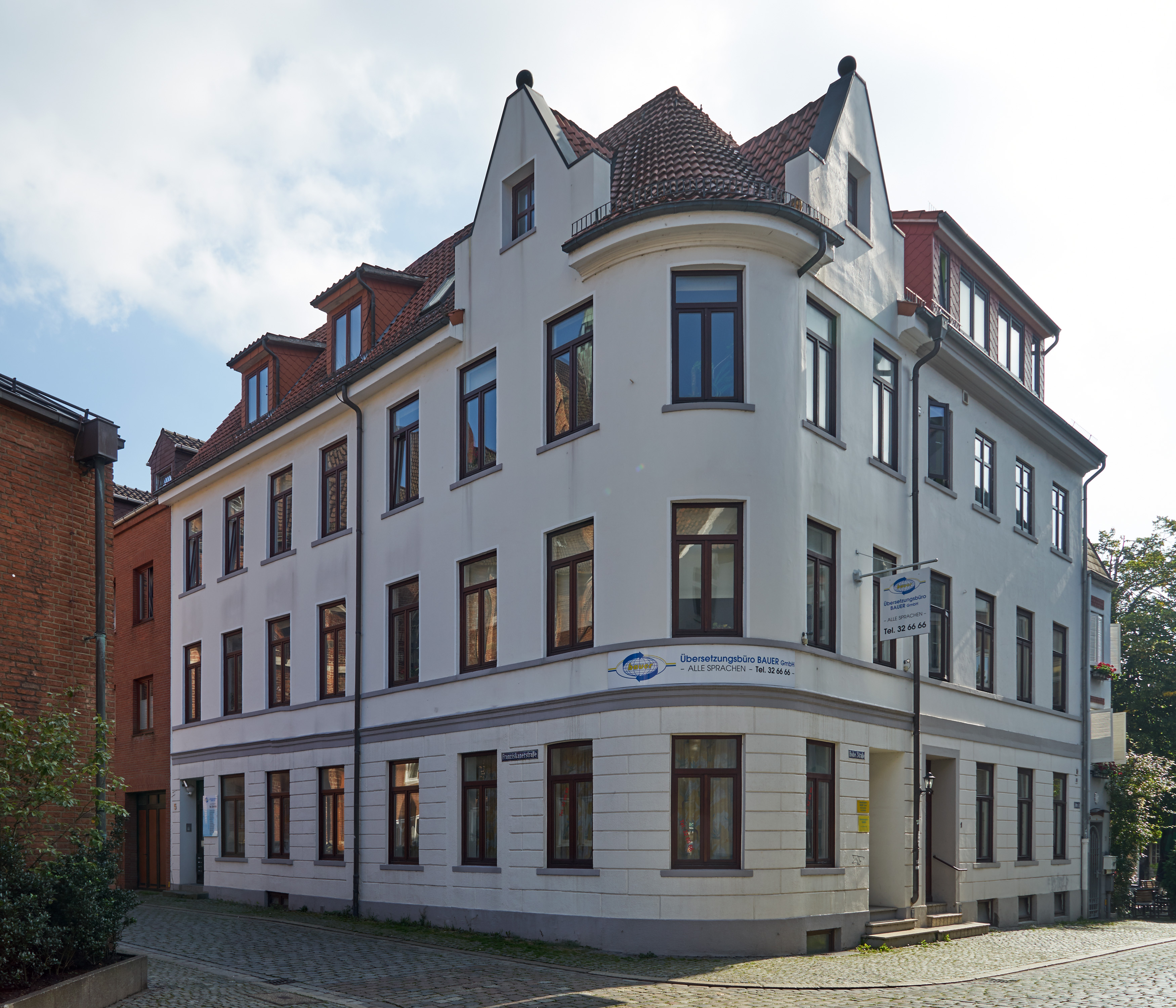 Wohnhaus in Bremen, Franziskanerstraße 5Das abgebildete Objekt ist ein geschütztes Kulturdenkmal in der Freien Hansestadt Bremen, mit der Nr. 1474 beim Landesamt für Denkmalpflege registriert.